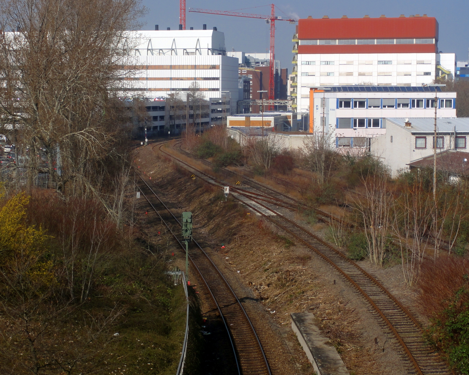 Gleise kurz vor dem südlichen Werkstor der BASF, Blickrichtung Norden.